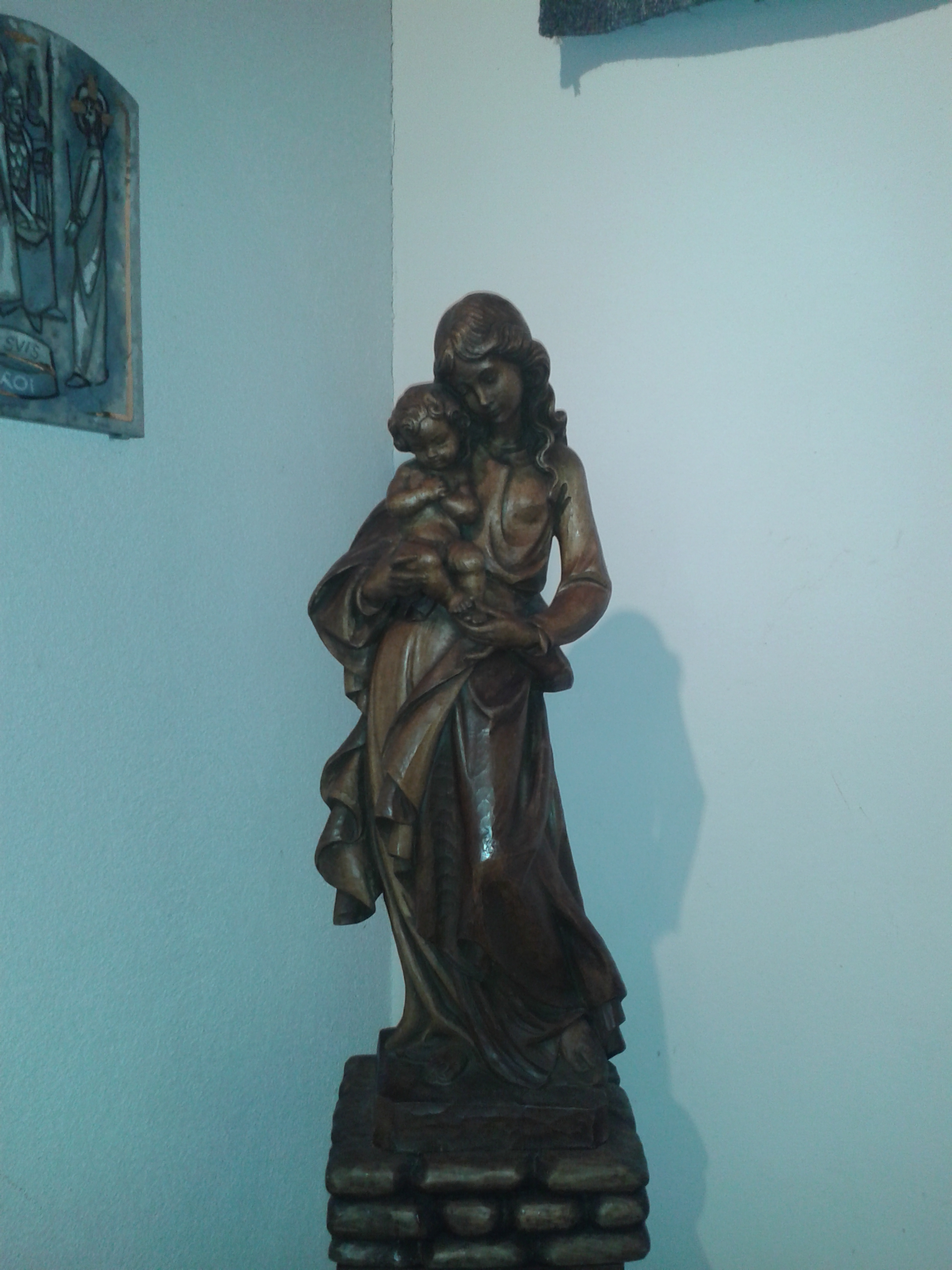 Statue mariale de l'église Saint-Victor d'Ollon